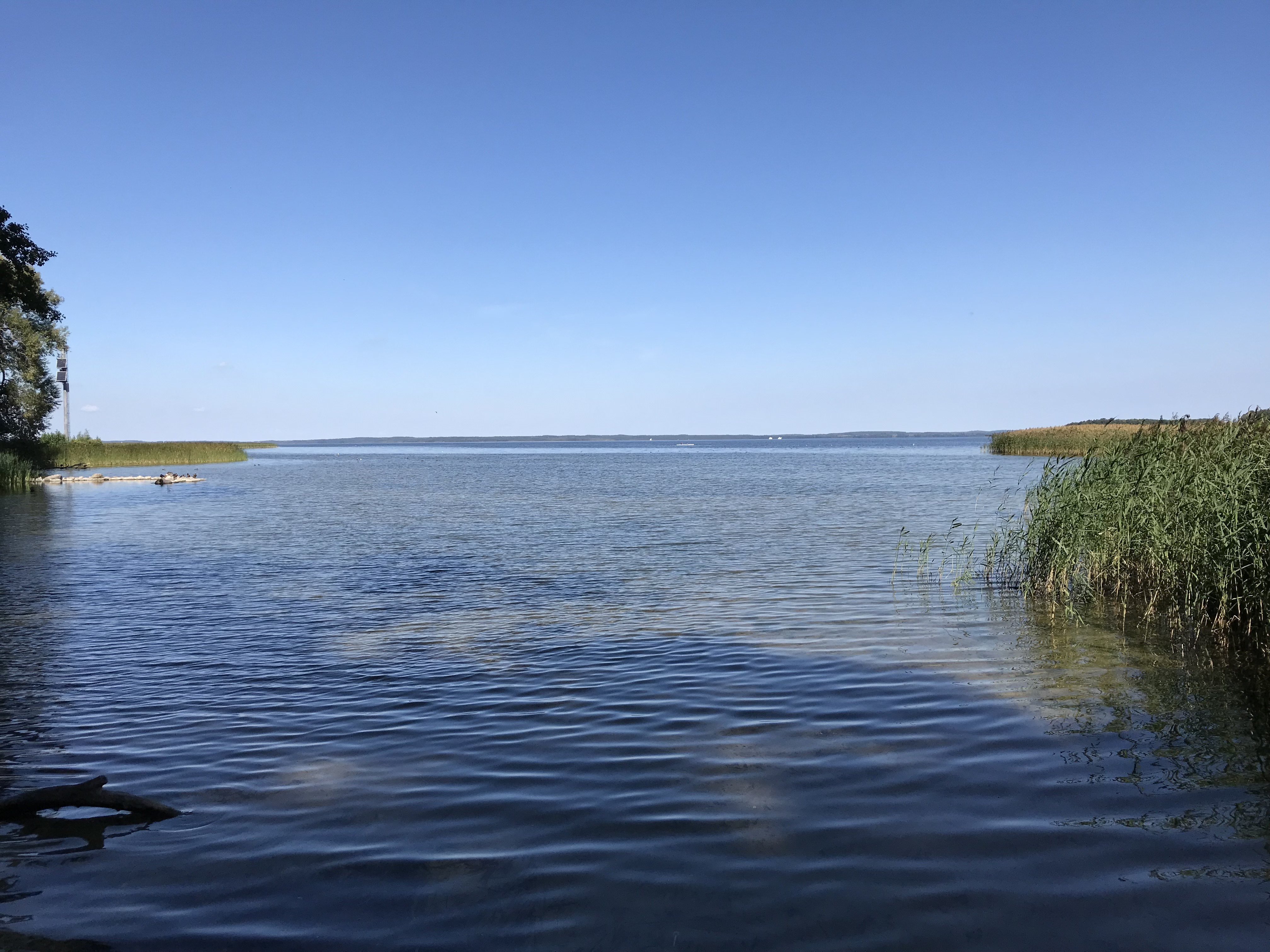 Jezioro Śniardwy w Niedźwiedzim Rogu